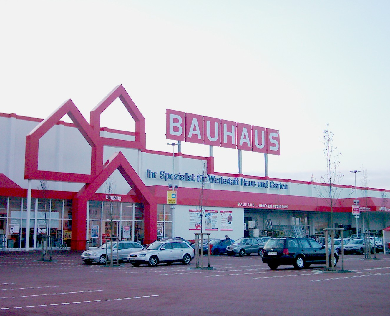 Der Bauhaus Markt in Barsbüttel, Schleswig-Holstein.